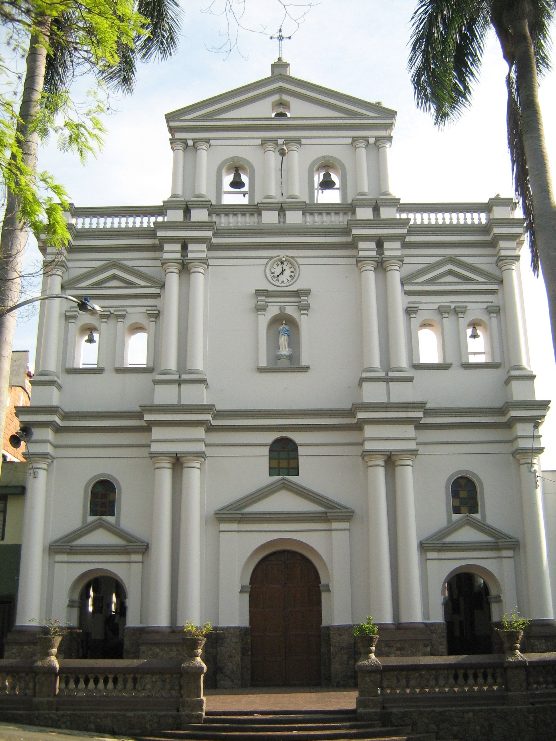 Iglesia de Nuestra Señora de los Dolores del barrio de Robledo en Medellín, Colombia